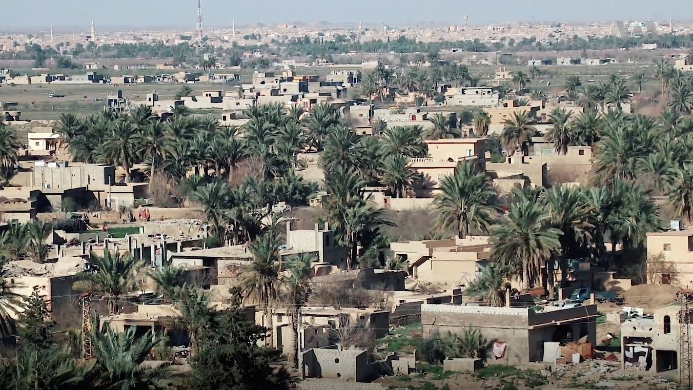 Vue de Baghouz, le 4 mars 2019.